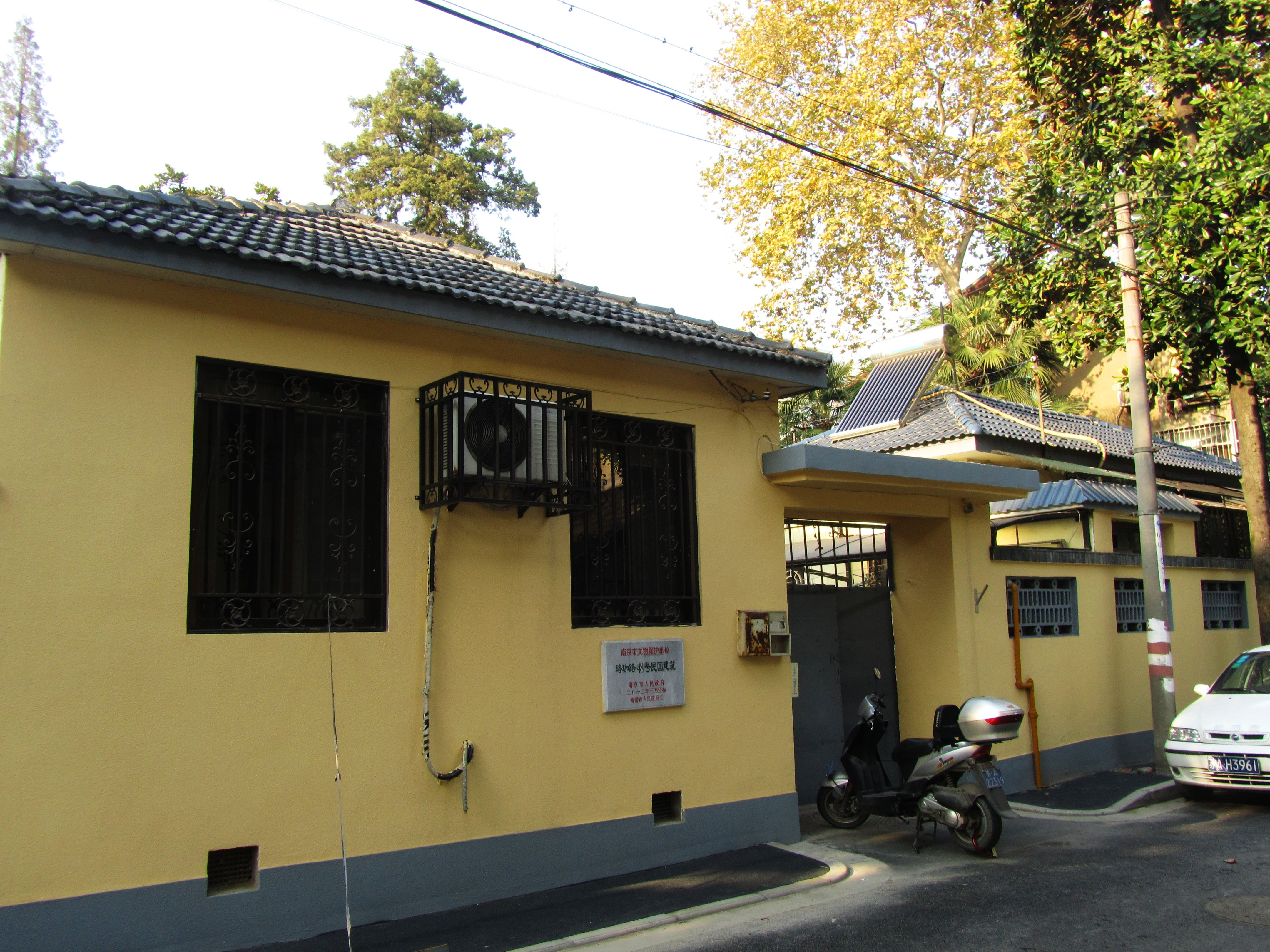 颐和路公馆区——珞珈路48号竺可桢故居大门。